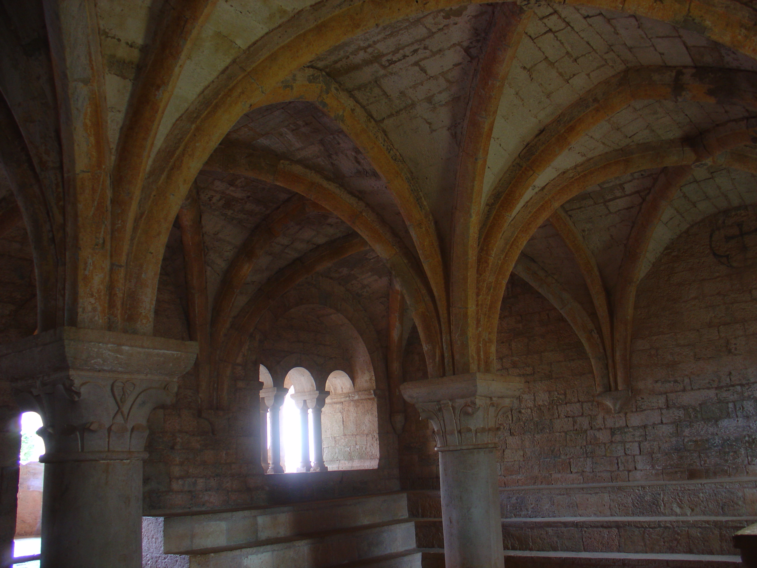 Abbaye du Thoronet (Vaucluse, France).